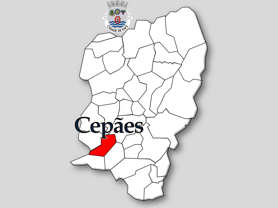 Censos 1864/2011